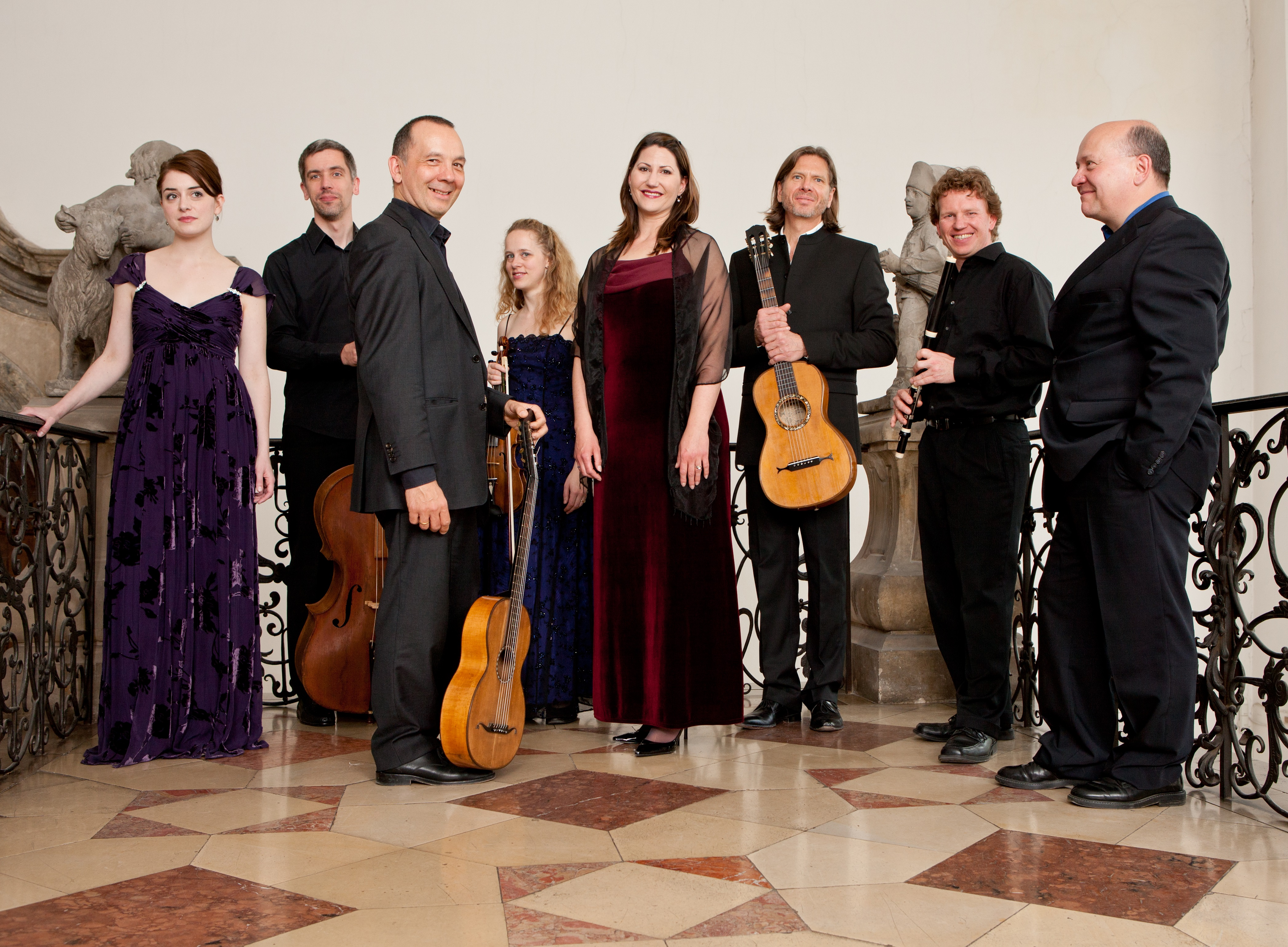 Besetzung Programm "Rose of Sharon"